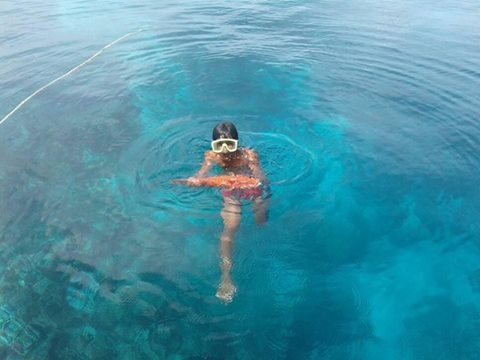 Berbahaya bagi keselamatan tapi Kompresor masih terus digunakan oleh para nelayan peneyelam ikan hidup di Jinato Takabonerate Selayar.